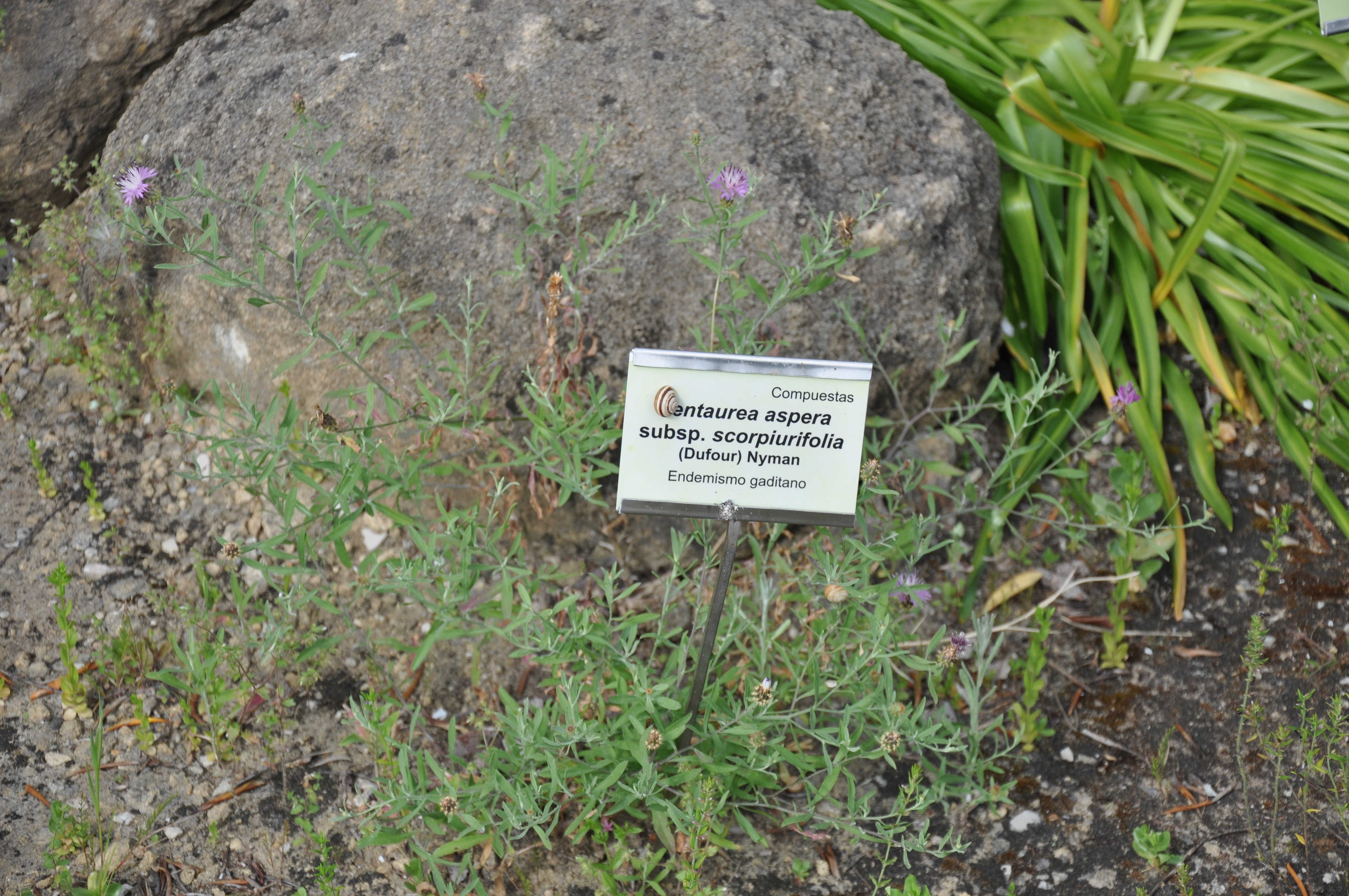 Jardín Botánico El Aljibe, Alcalá de los Gazules, Cádiz, España.